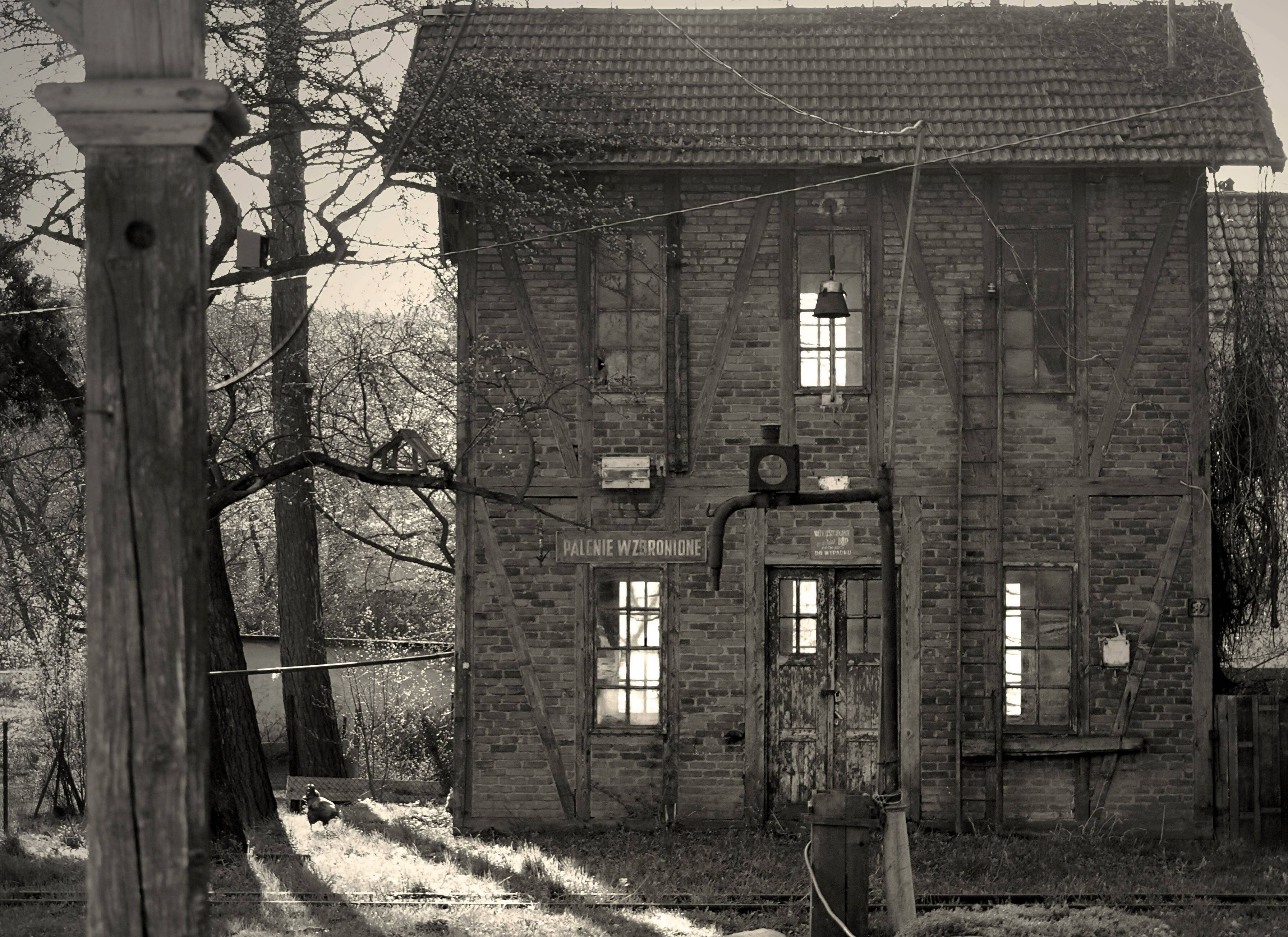 Kańczuga - wieża ciśnień w zespole dworcowym kolejki wąskotorowej Przeworsk-Dynów